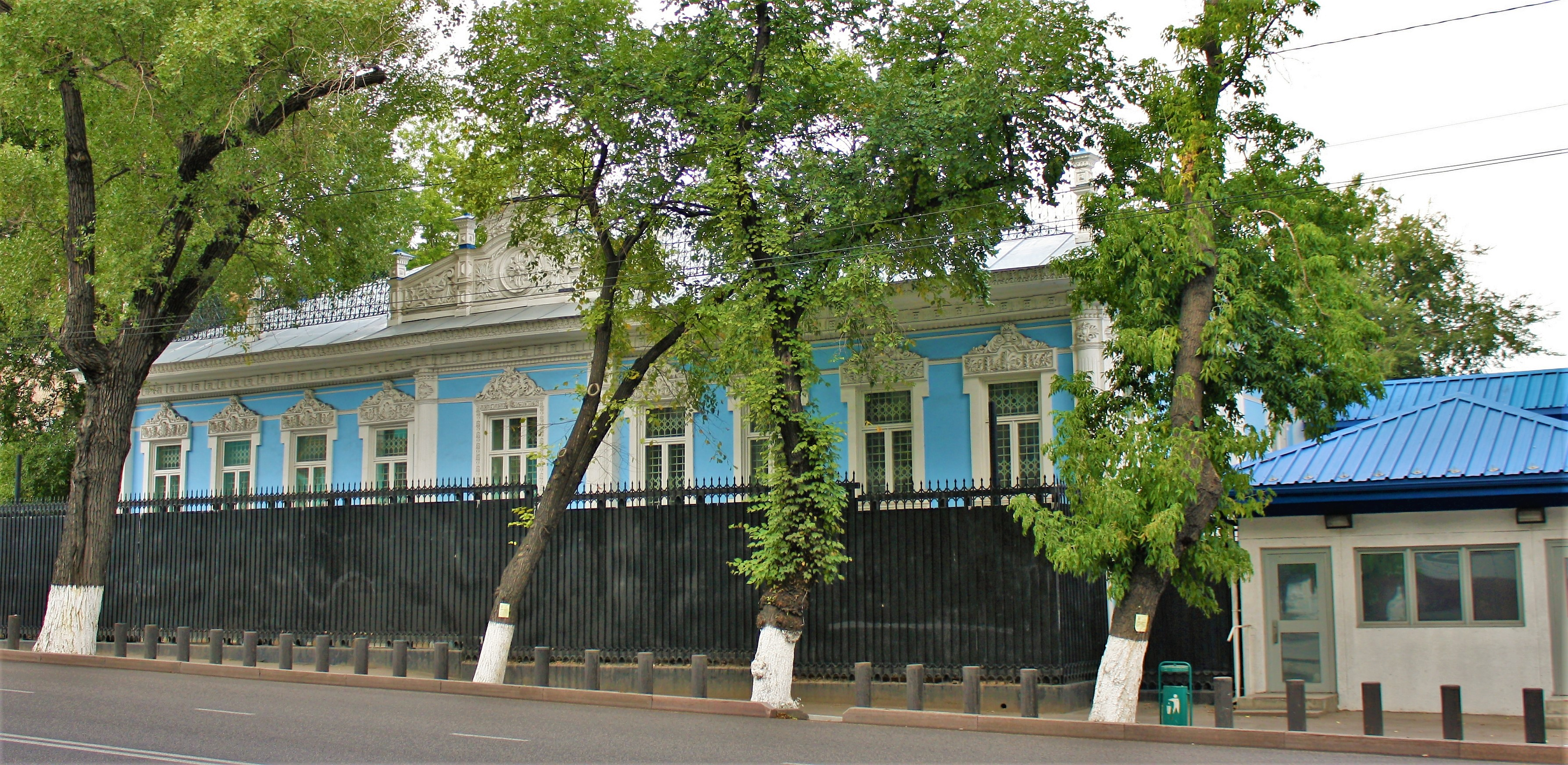 Здание консульства Франции в Республике Казахстан (бывший дом купца Шахворостова), Алма-Ата, проспект Назарбаева, 99. Построено в 1890 году